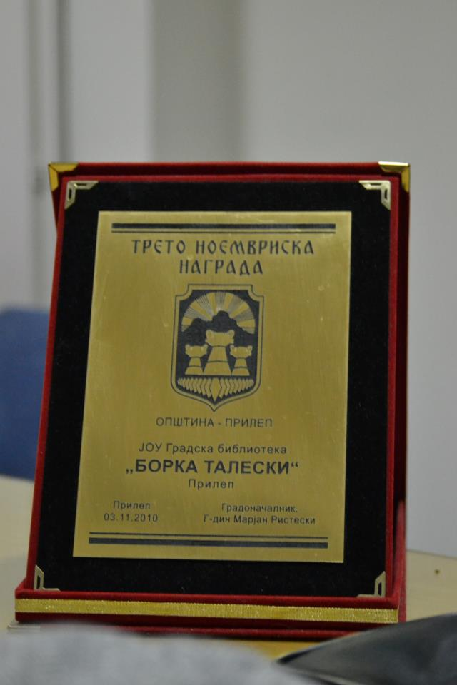 Третоноемвриска награда